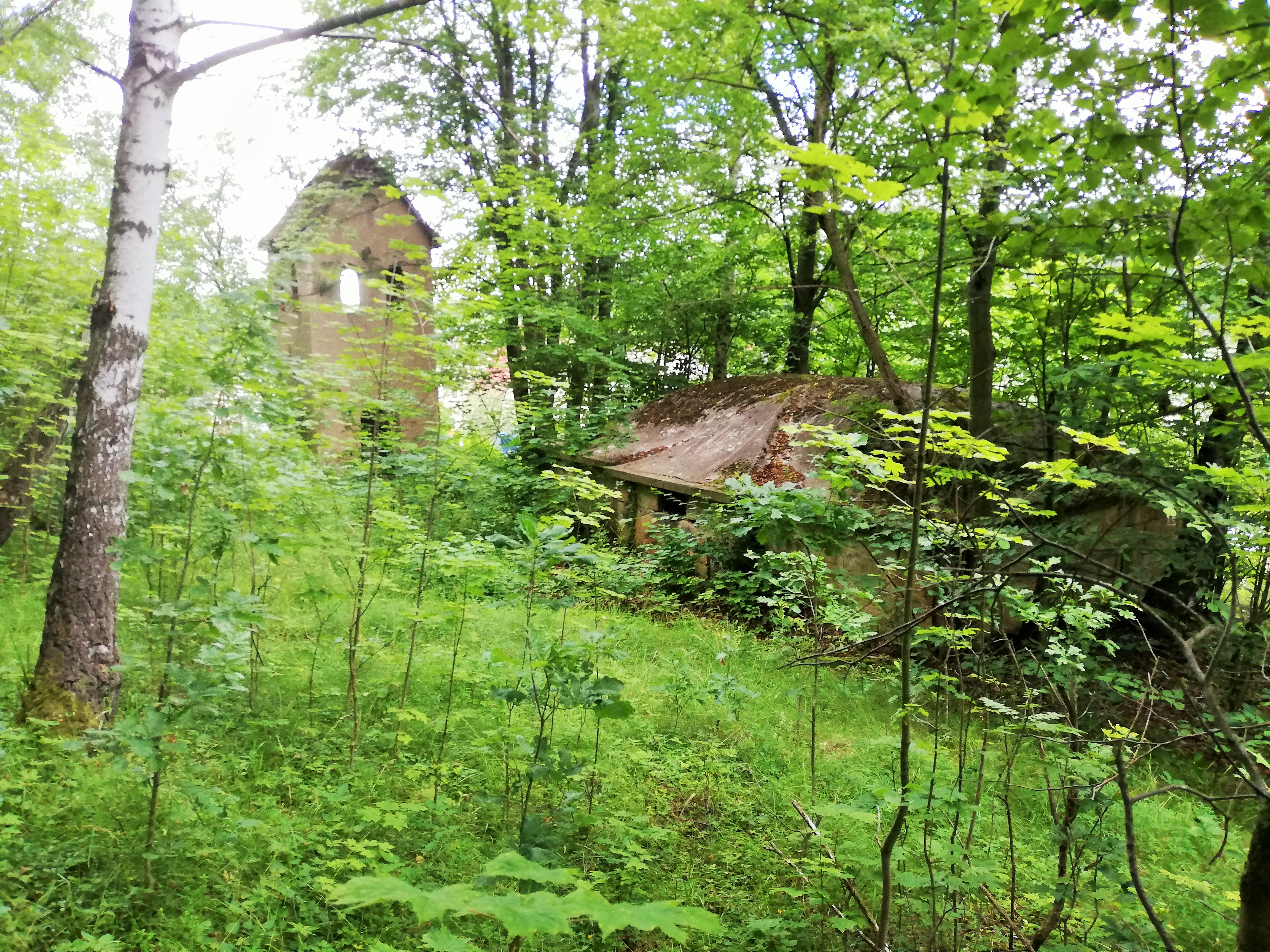 na zdjęciu widoczna dzwonnica oraz grobowiec.